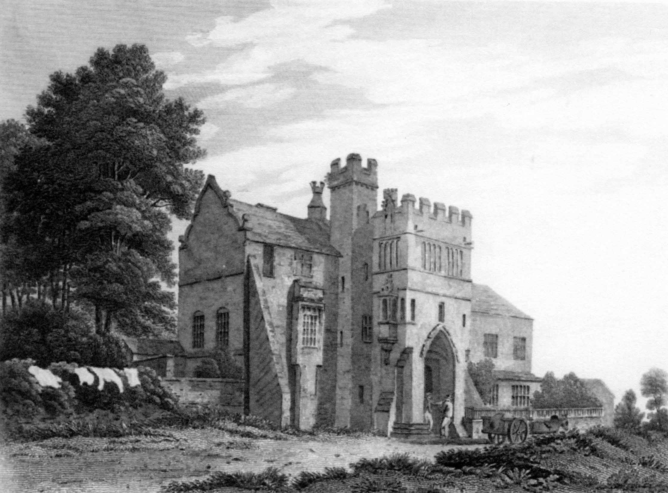 Saighton Grange (engraving after George Pickering)